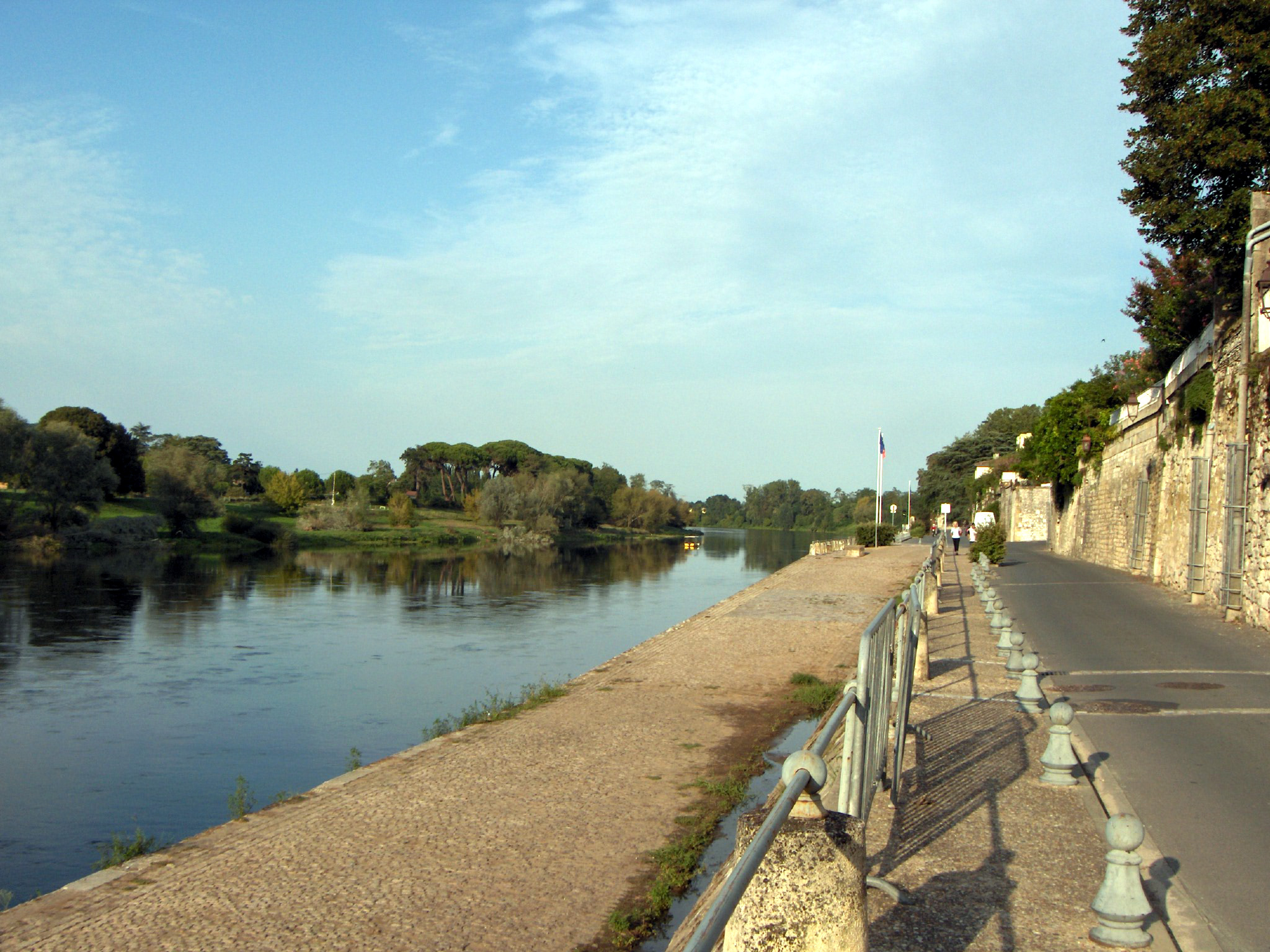 La Dordogne à Sainte-Foy-la-Grande, en Gironde Description technique Photographie prise avec un appareil numérique HP Photosmart R707 5,1 MPx. f/4,8, 1/648 s, ISO 100